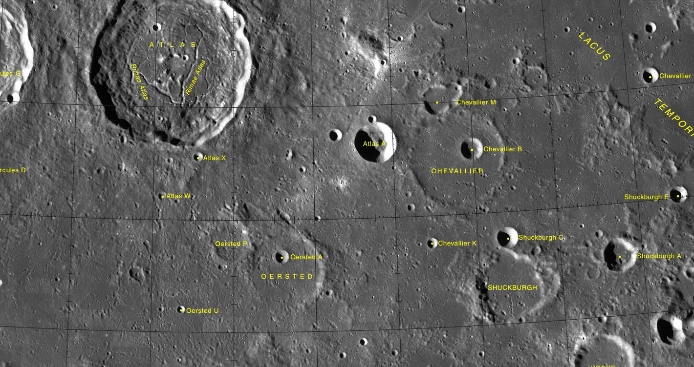 Cráter Chevallier (LRO)